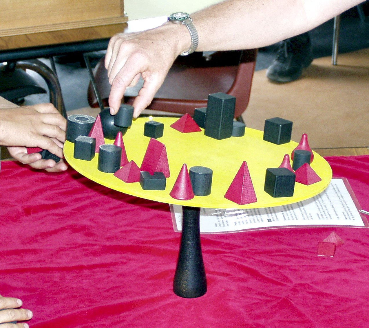 Bamboleo (Zoch Spiele) lors d'une animation à Irigny (France)